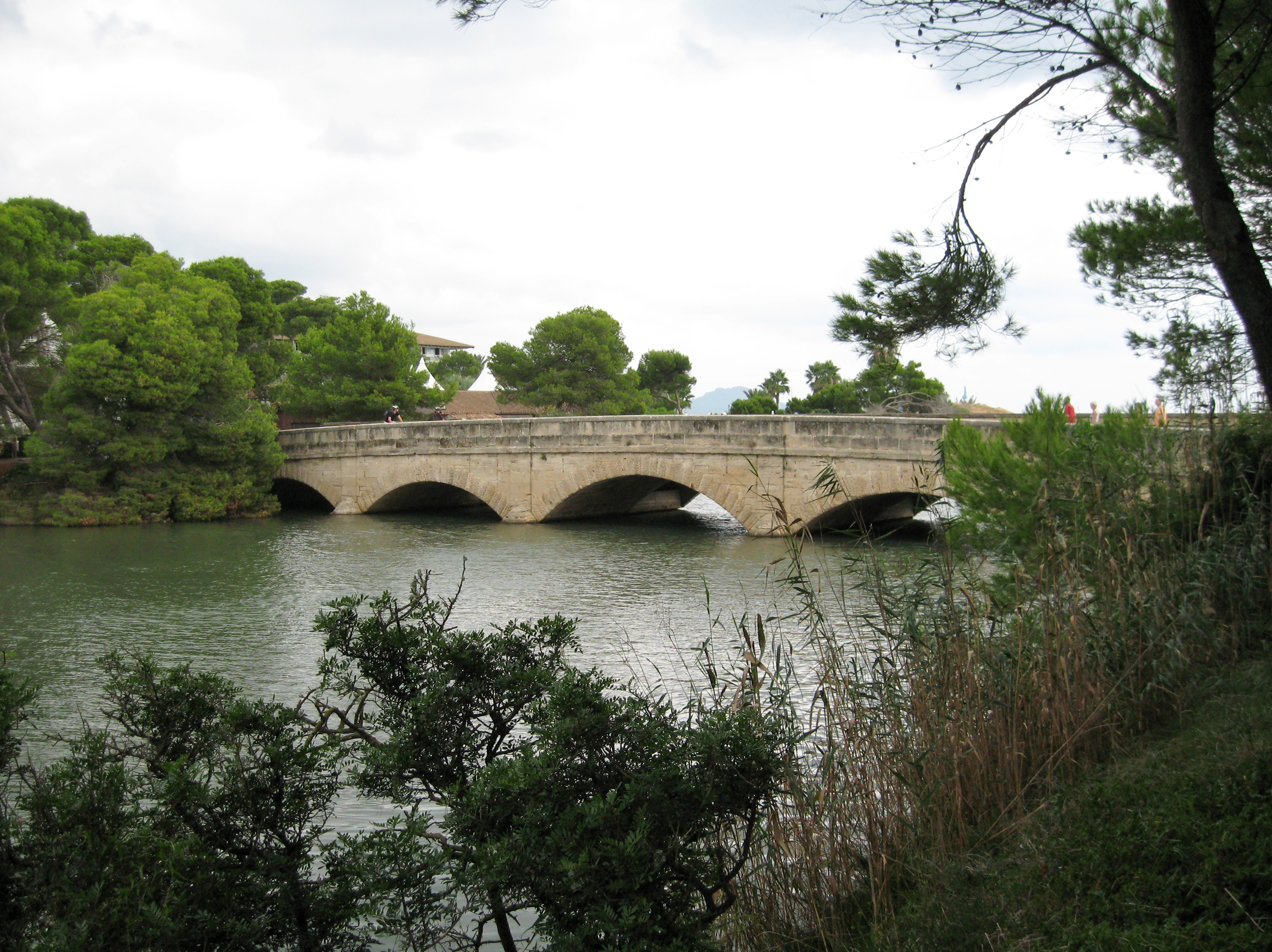 Pont dels Anglesos am Eingang des Parc natural de s’Albufera de Mallorca, Gemeinde Muro, Mallorca, Spanien